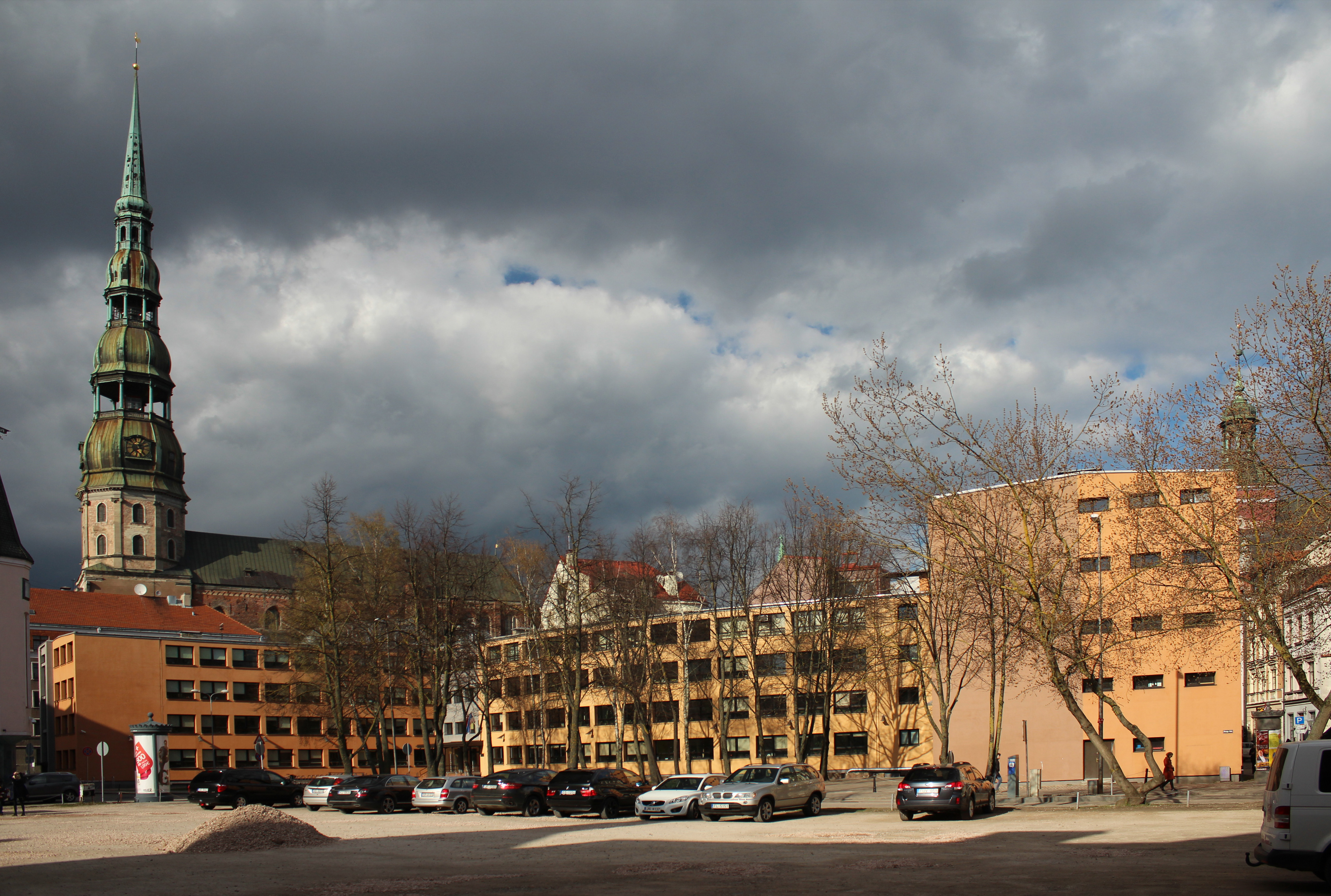 Рижская гимназия № 3